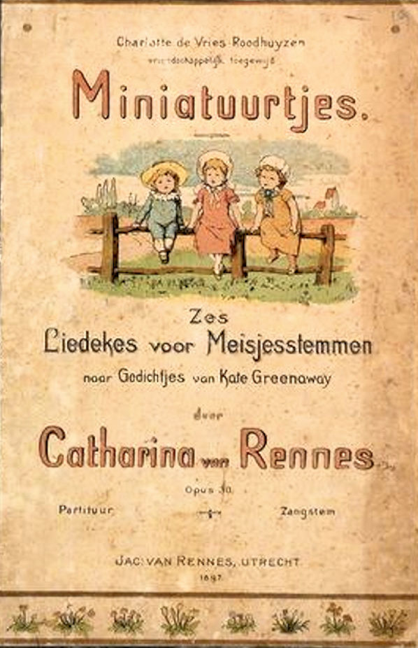 Miniatuurtjes. Zes Liedekes voor Meisjesstemmen naar Gedichtjes van Kate Greenaway (1897), van Catharina van Rennes.